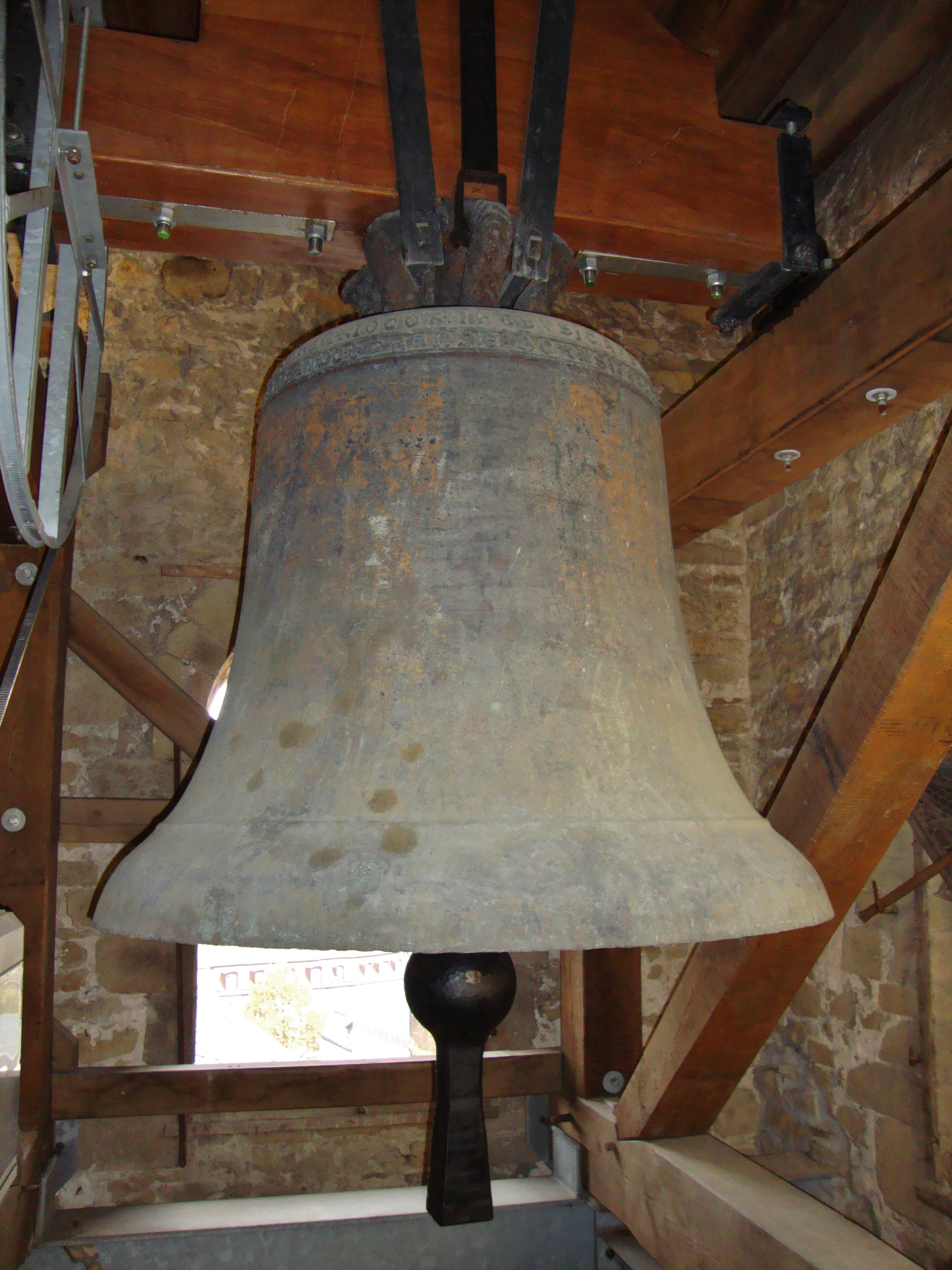 Herford, Münster. Gloriosa aus der Zeit um 1300.